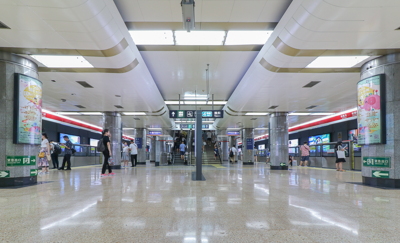 中文（中国大陆）: 北京地铁1号线西单站站台